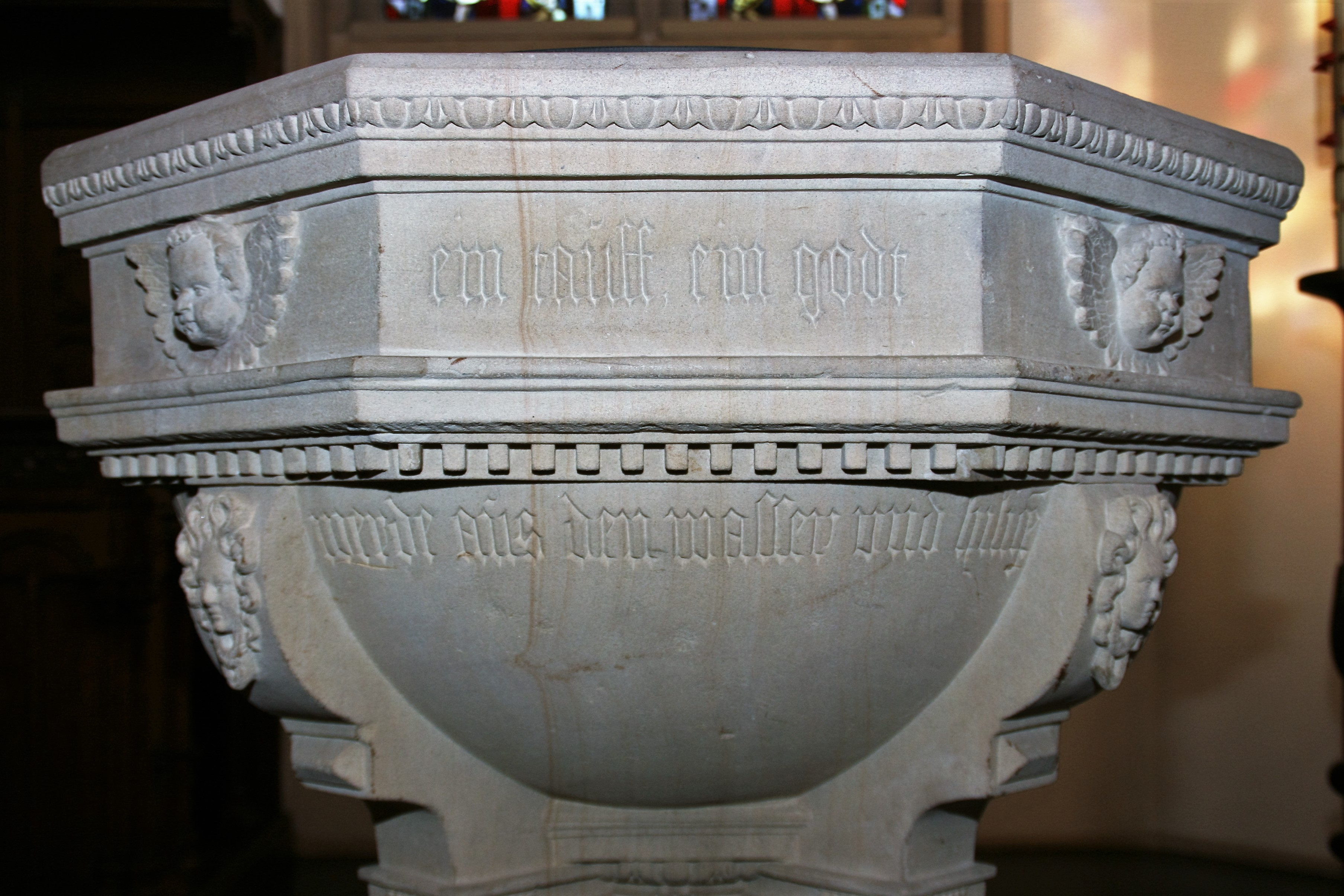 Inschrift des Sendenhorster Taufsteins 2, Standort: St. Laurentiuskirche, Westkirchen.